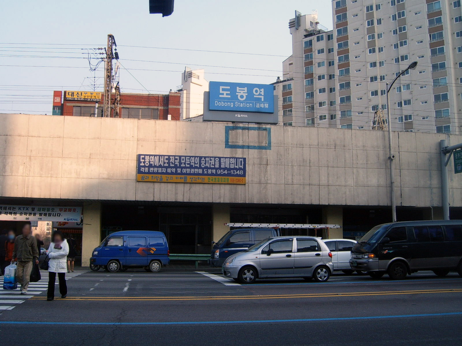 Dobong Station (en es io ja ko)